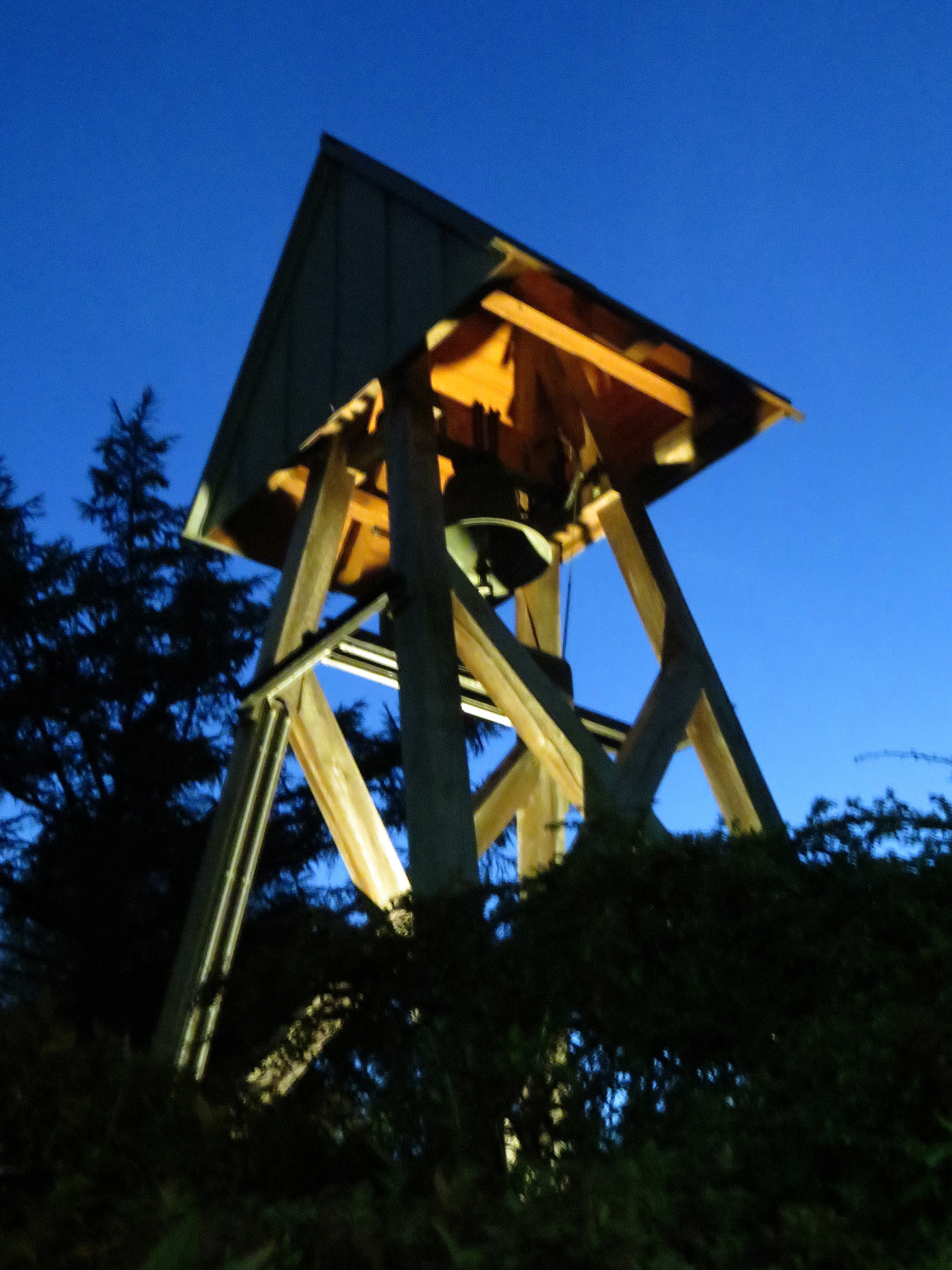 St. Hans-Kirche, Dänische Kirche Kappelner Straße, hölzerner Glockenturm, Bild 01